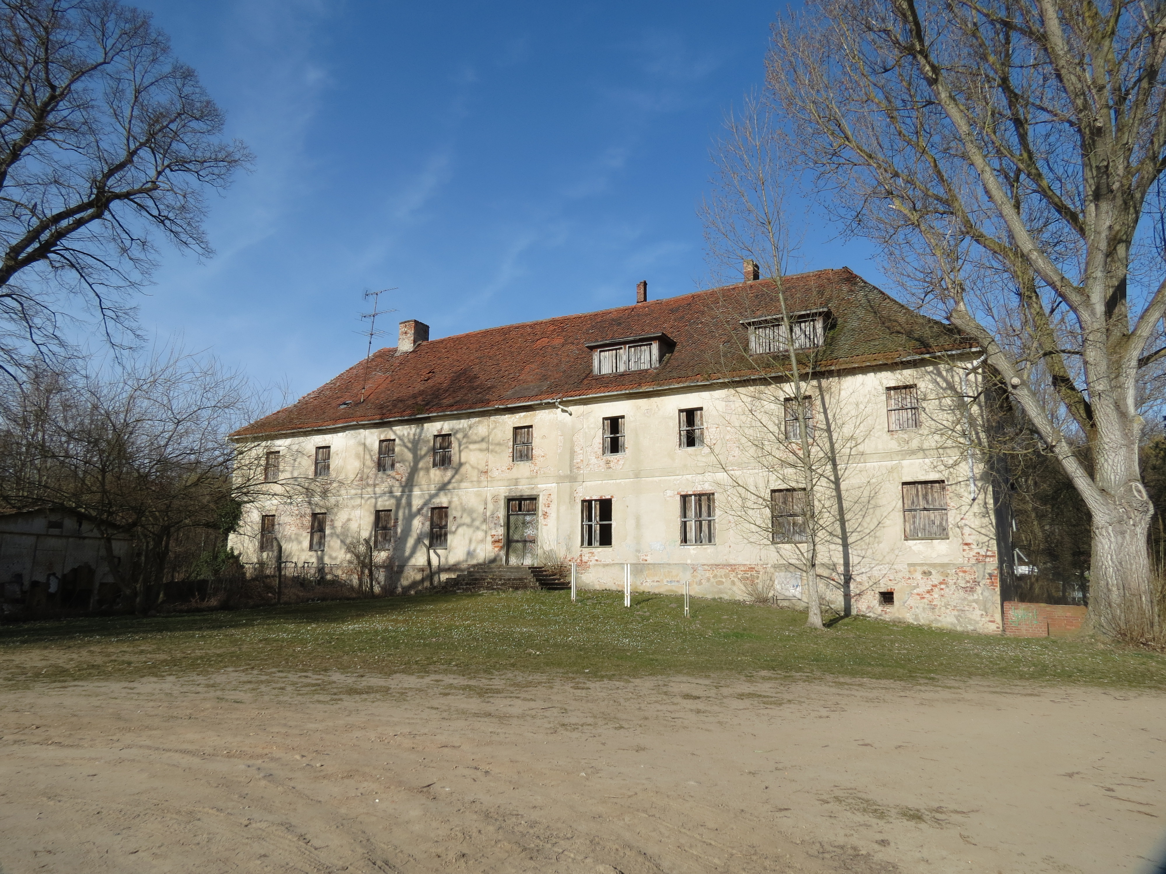 Ehemaliges Amtshaus (Vorderseite) in Flecken Zechlin, Lkr. Ostprignitz-Ruppin, Brandenburg, Deutschland